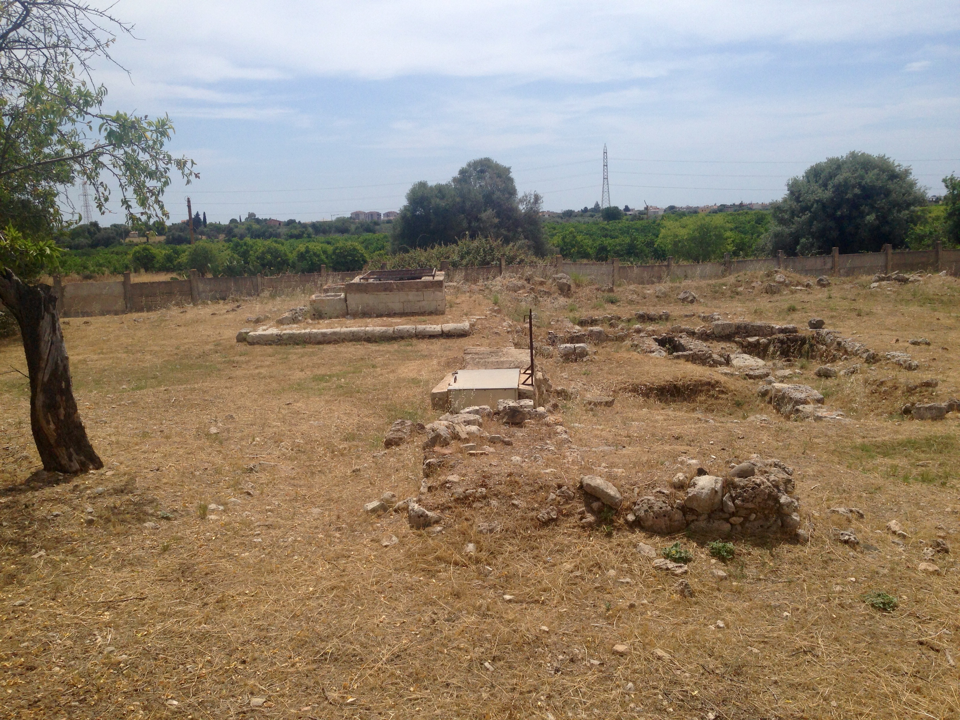 Cozzo Collura